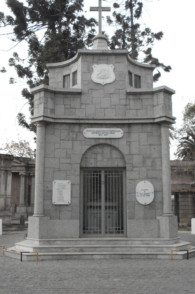 Tumba de Manuel Baquedano en el Cementerio General de Santiago de Chile.